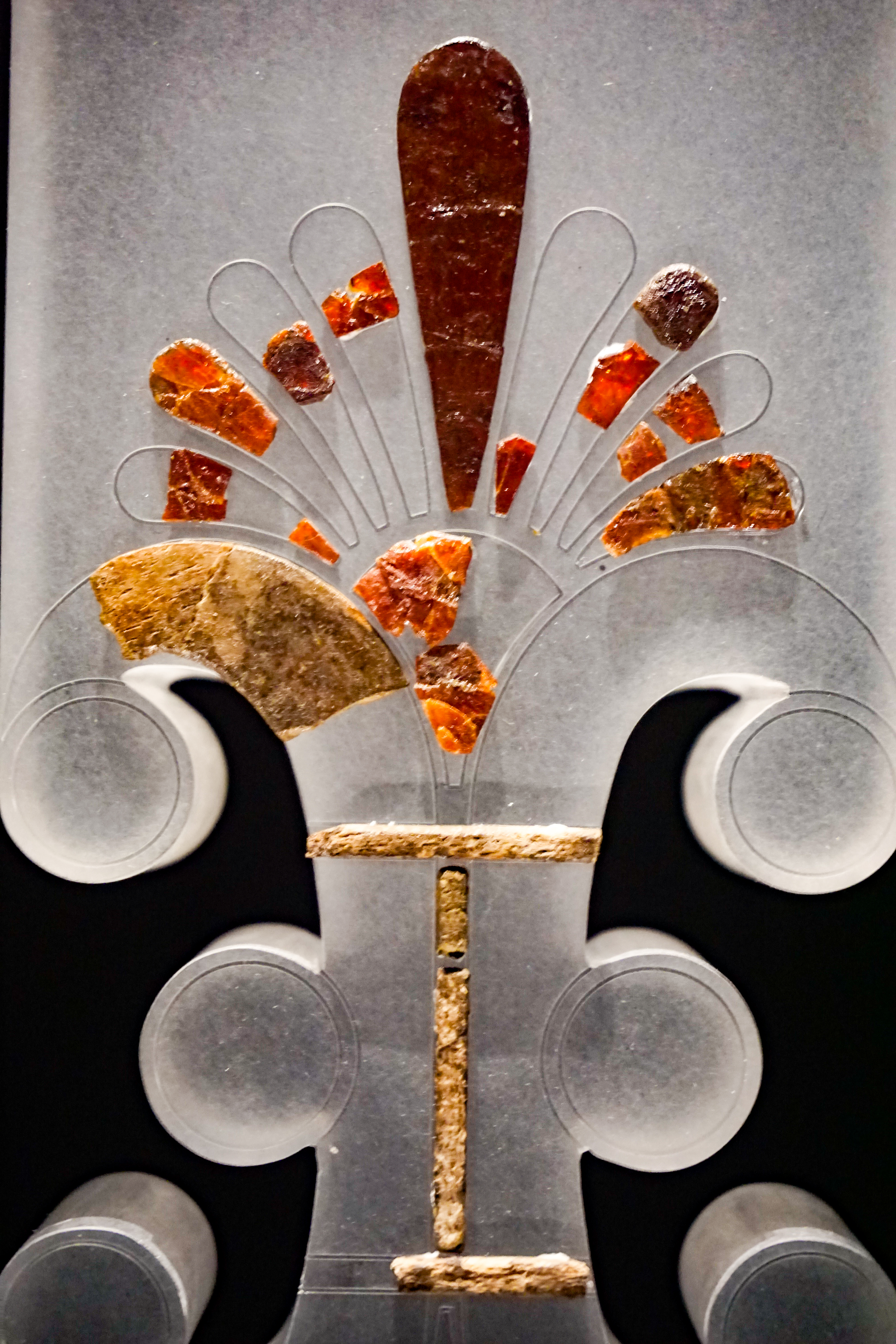 Prunkgrab Grafenbühl: Elfenbein, Bernstein und Knochenintarsien einer griechischen Liege (Teilrekonstruktion) . Aus der Ausstellung Wahre Schätze - Kelten, im Landesmuseum Württemberg, Stuttgart.